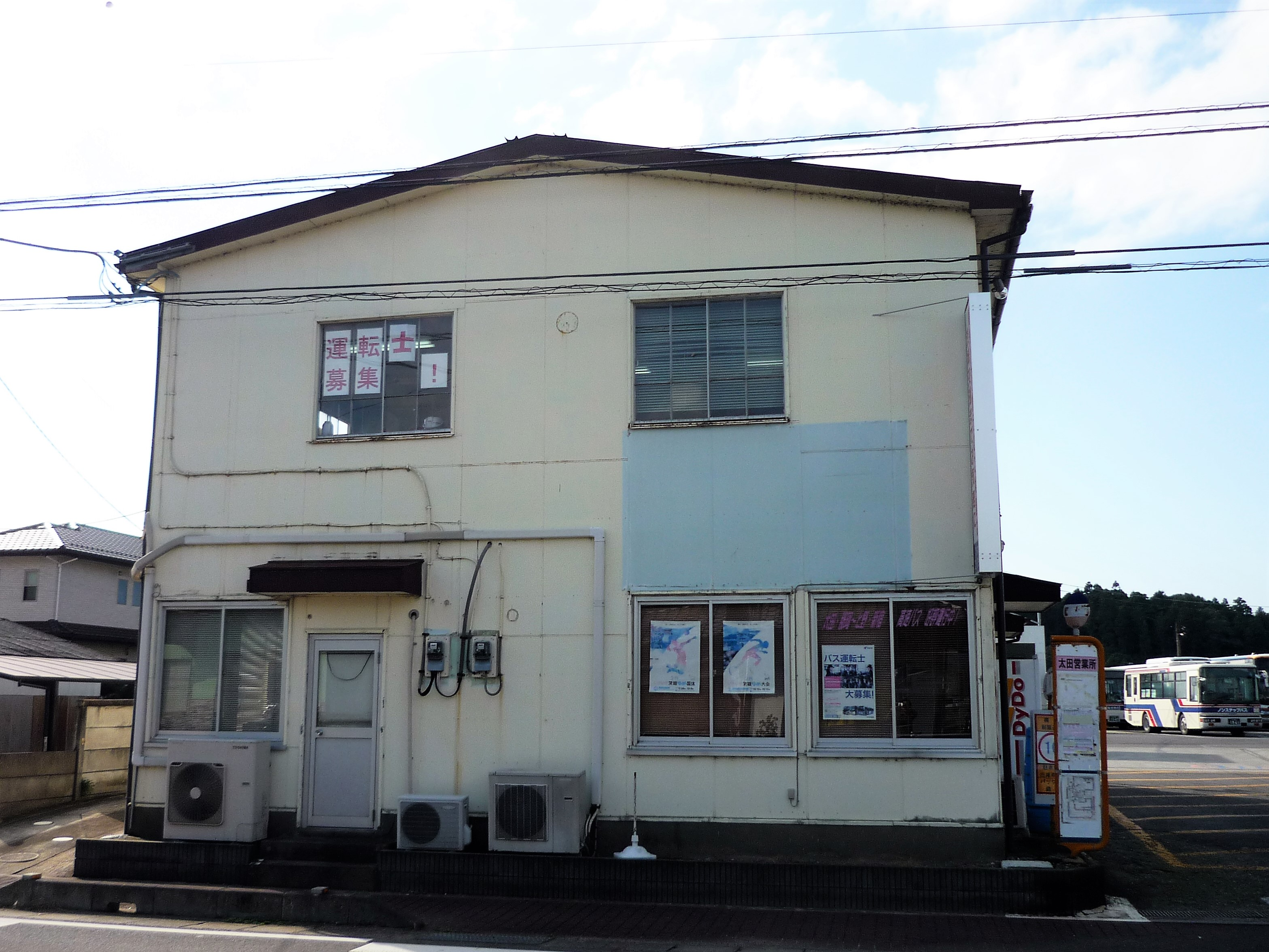 茨城交通太田営業所 Panasonic Lumix DMC-FS3